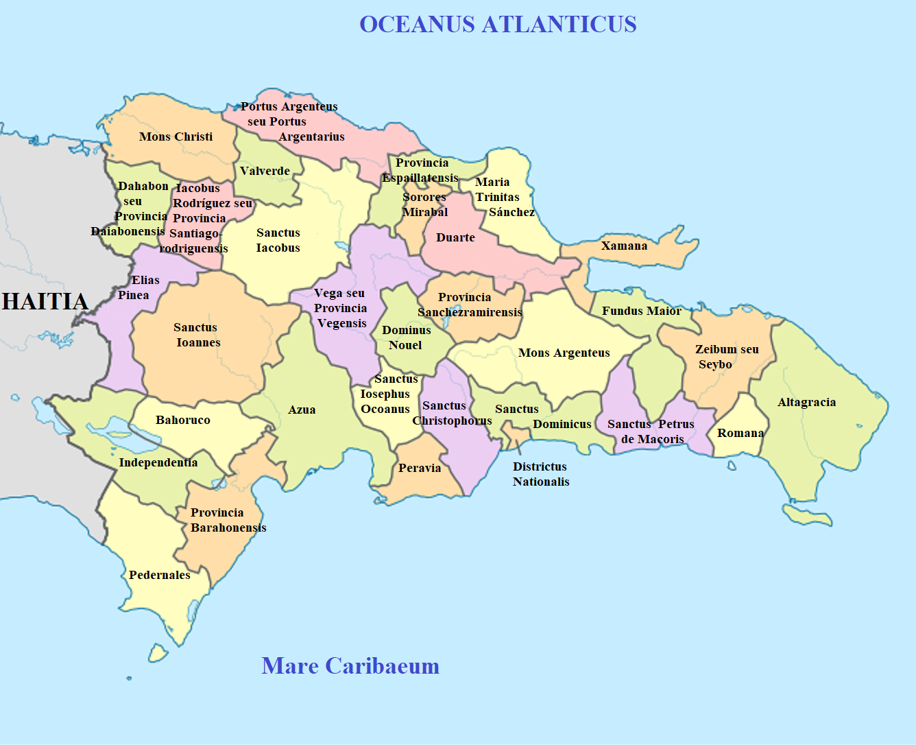 Provinciae Rei publicae Dominicianae.